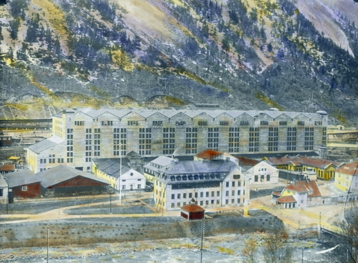 Rjukan fabrikker tilhørende Norsk Hydro med elva i forgrunnen. Ukjent år for fotografering. Håndkolorert dias.